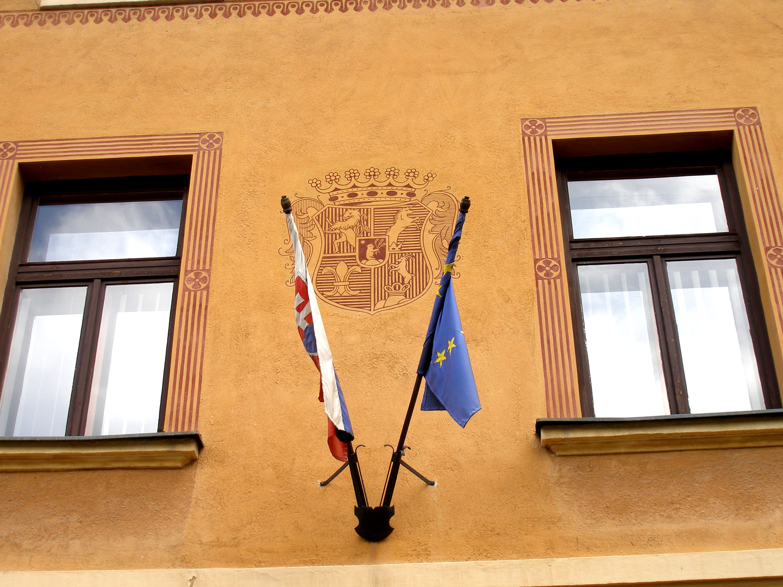 Priečelie budovy štátneho archívu.Námestie majstra Pavla. Mesto Levoča.